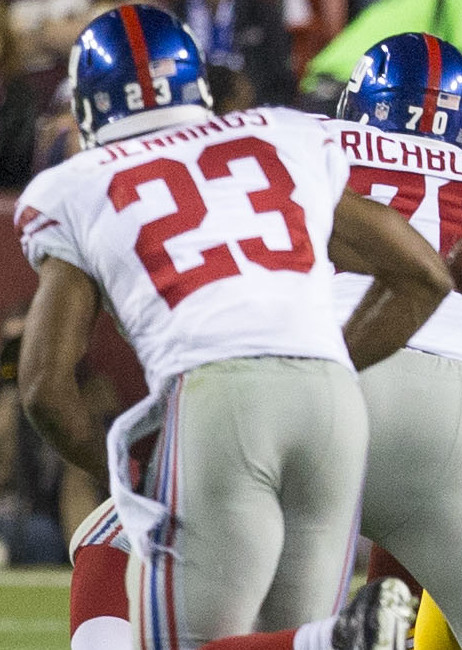 Giants at Redskins 9/25/14